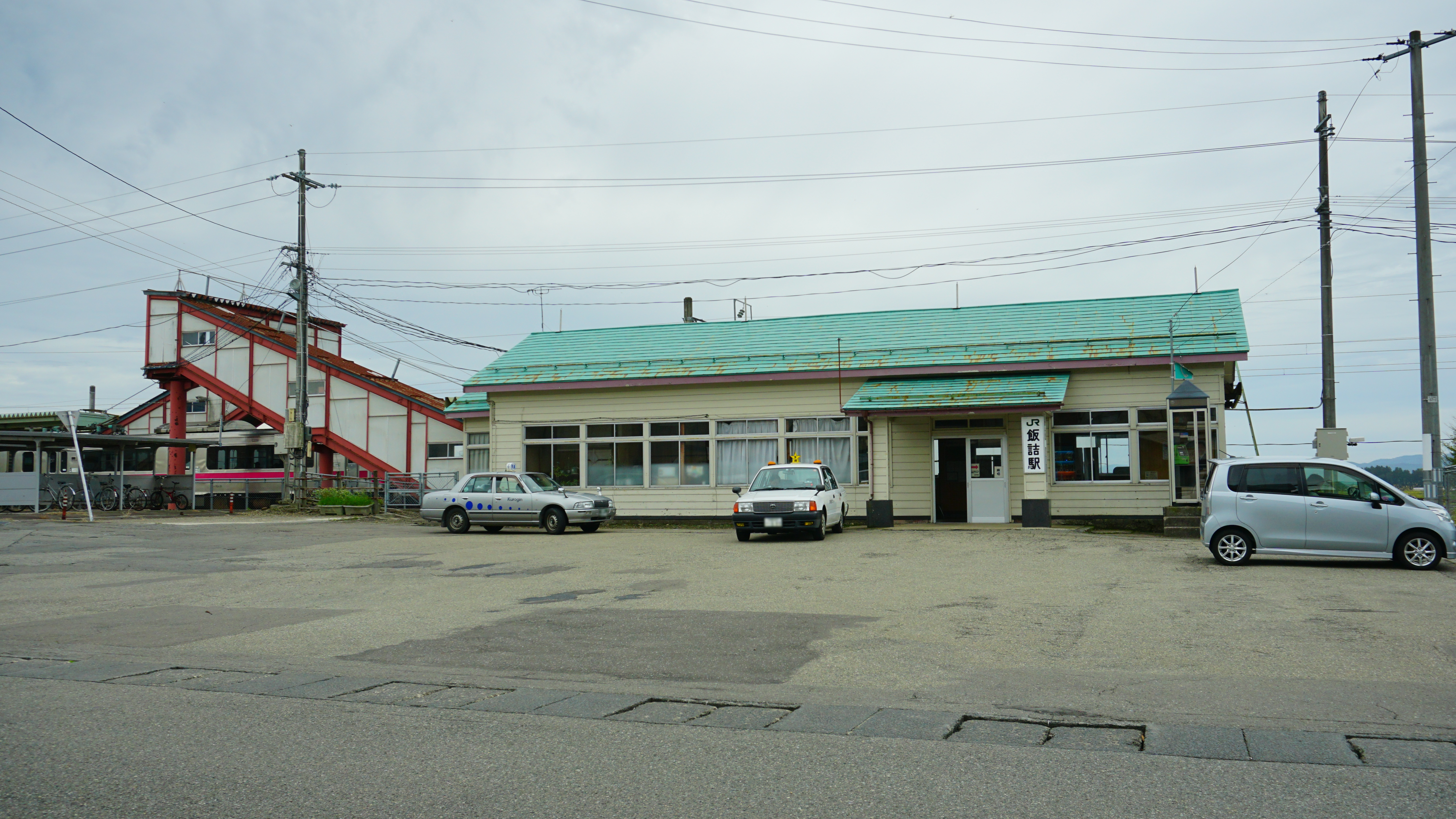 奥羽本線 飯詰駅